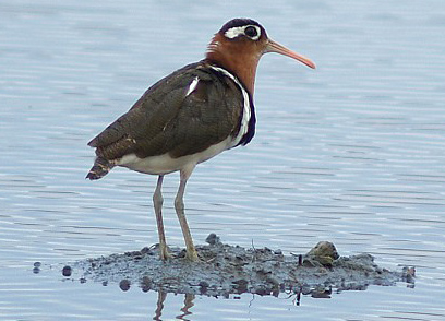 Rallbeckasin, adult hona.